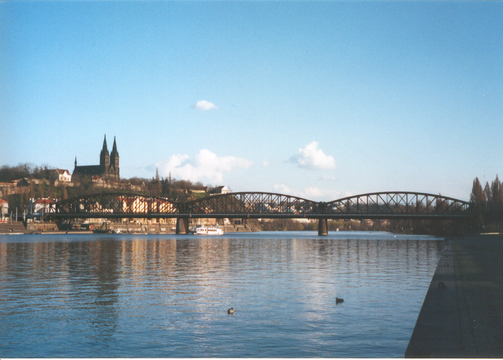 Železniční most (Vyšehrad - Smíchov)